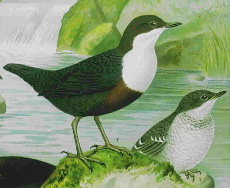 white-bellied dipper Gemeinfrei: aus Naumann - Naturgeschichte der Vögel, 1905; Bearbeitung aus englischer wikipedia User:Jimfbleak